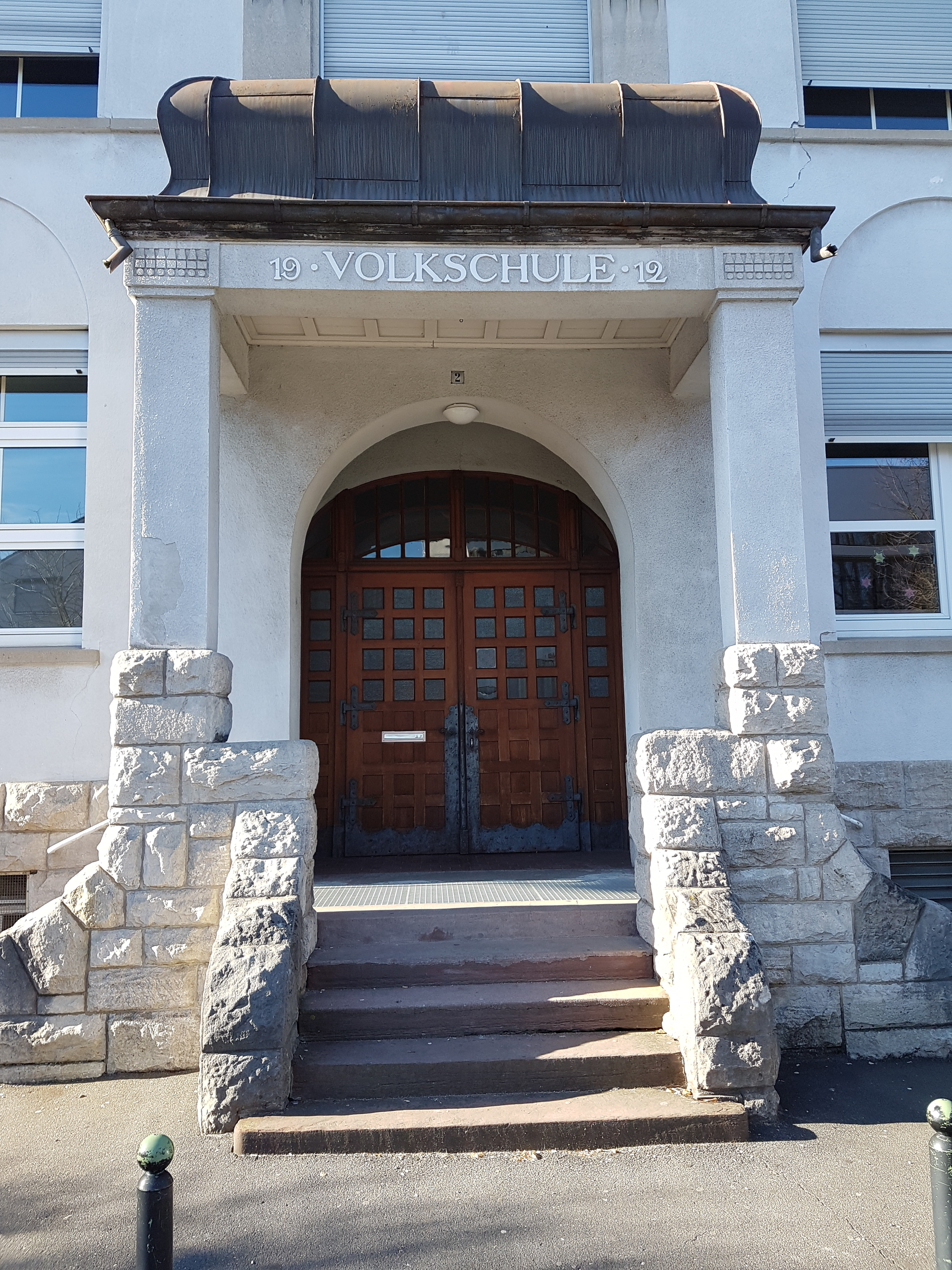 Gemeinschaftsschule Lauda-Königshofen Eingang altes Schulhaus Ehemalige Volkschule, heute Sekundarstufe der Gemeinschaftsschule